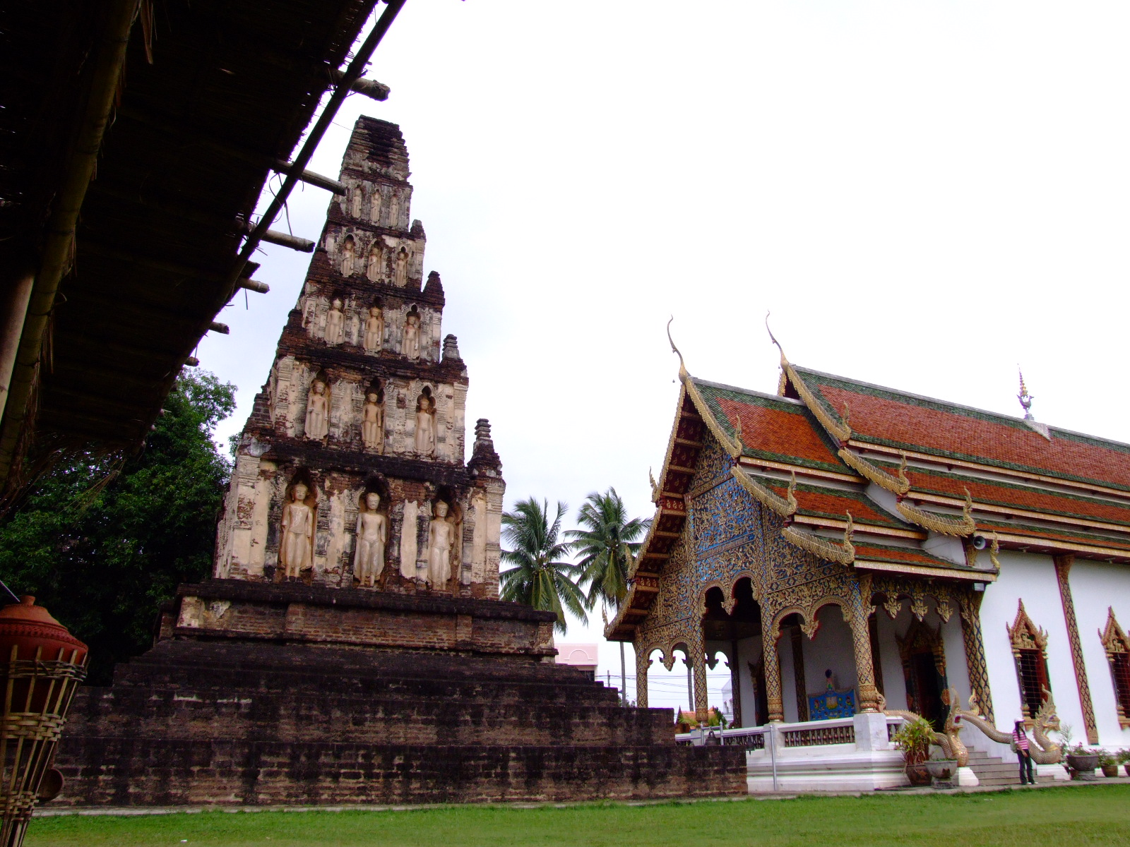 วัดจามเทวี หมวดหมู่:ภาพวัดไทย สัญญาอนุญาต The present photo is taken or owned by Thanyakij. The camera used was: Fujifilm Finepix S9500.